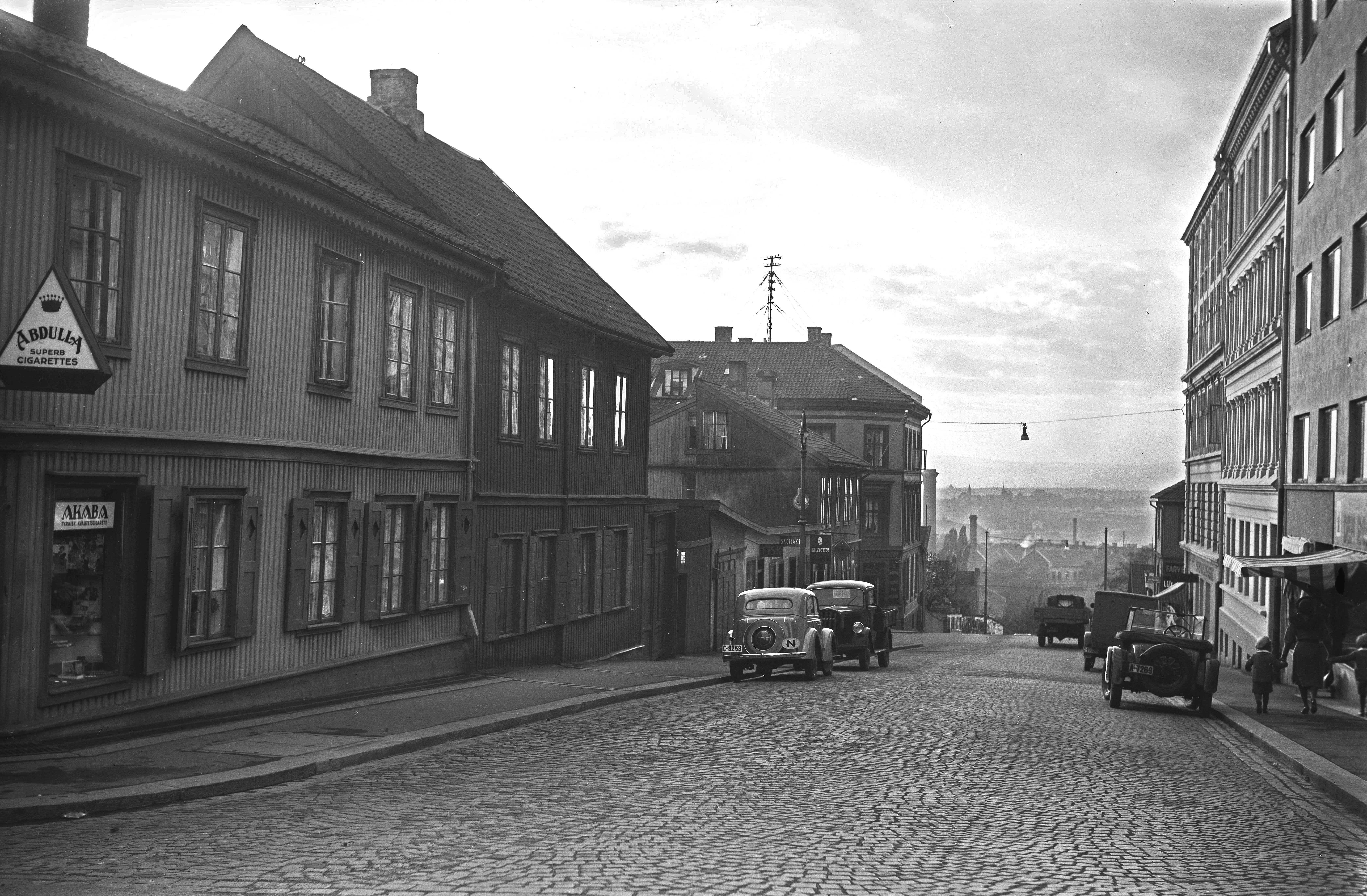 Bildet er hentet fra Nasjonalbibliotekets bildesamling. Anmerkninger til bildet var: Påskrift konvolutt: Torvdirektørens kontor Parker [Datering etter vurdering av eksterne: Kristiania for 100 år siden, utgiver Cappelen Damm] [Fotograf er usikker, datering er usikker] Nannestadgata, krysset ved Norderhovsgata og Kasper Fjerdingbys kolonial. Oslo, Oslo, Oslo